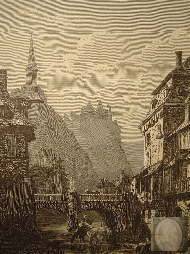 Vue prise à Vianden par M. G. Walckiers. Cette gravure (185 x 255 mm) représente le pont en pierre qui relie la ville haute à la ville basse, cette dernière est de construction plus récente. A l'arrière-plan se dressent les ruines du château et à l'avant-plan, de chaque côté de la rivière, se trouvent les chapelleries et les tanneries, lesquelles, quoique bien déchues de leur importance d'autrefois, constituent pour à cette époque la plus grande industrie du pays.